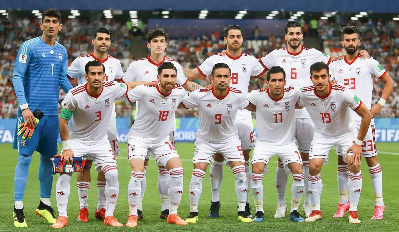 نیمه دوم بازی تیم‌های فوتبال ایران و پرتغال در جام جهانی ۲۰۱۸